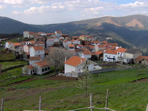 Jorge Alexandre Vicente Fernandes